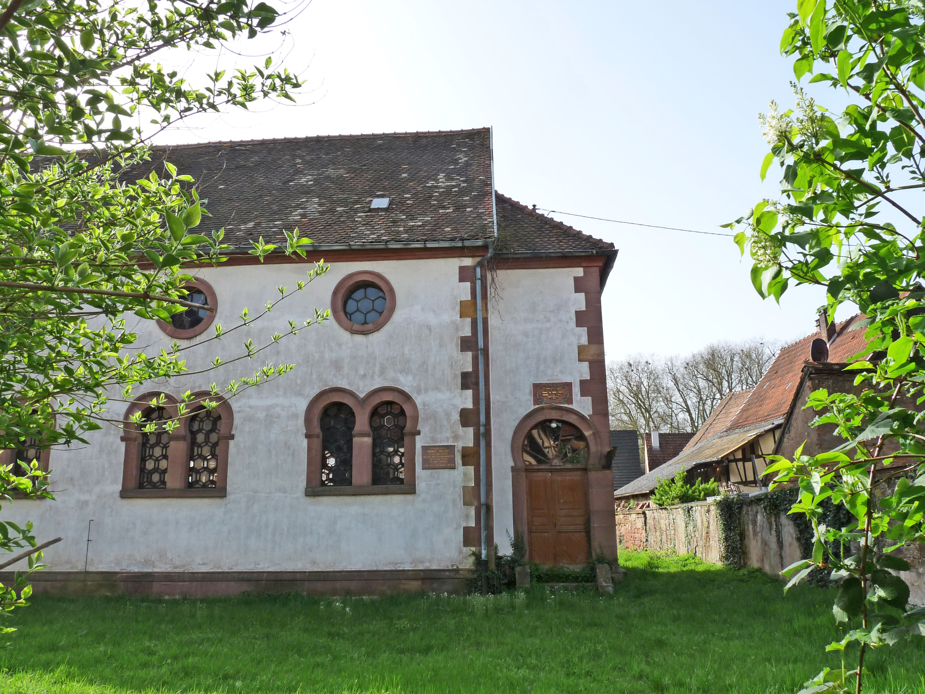 Ancienne synagogue de Reichshoffen (Bas-Rhin).